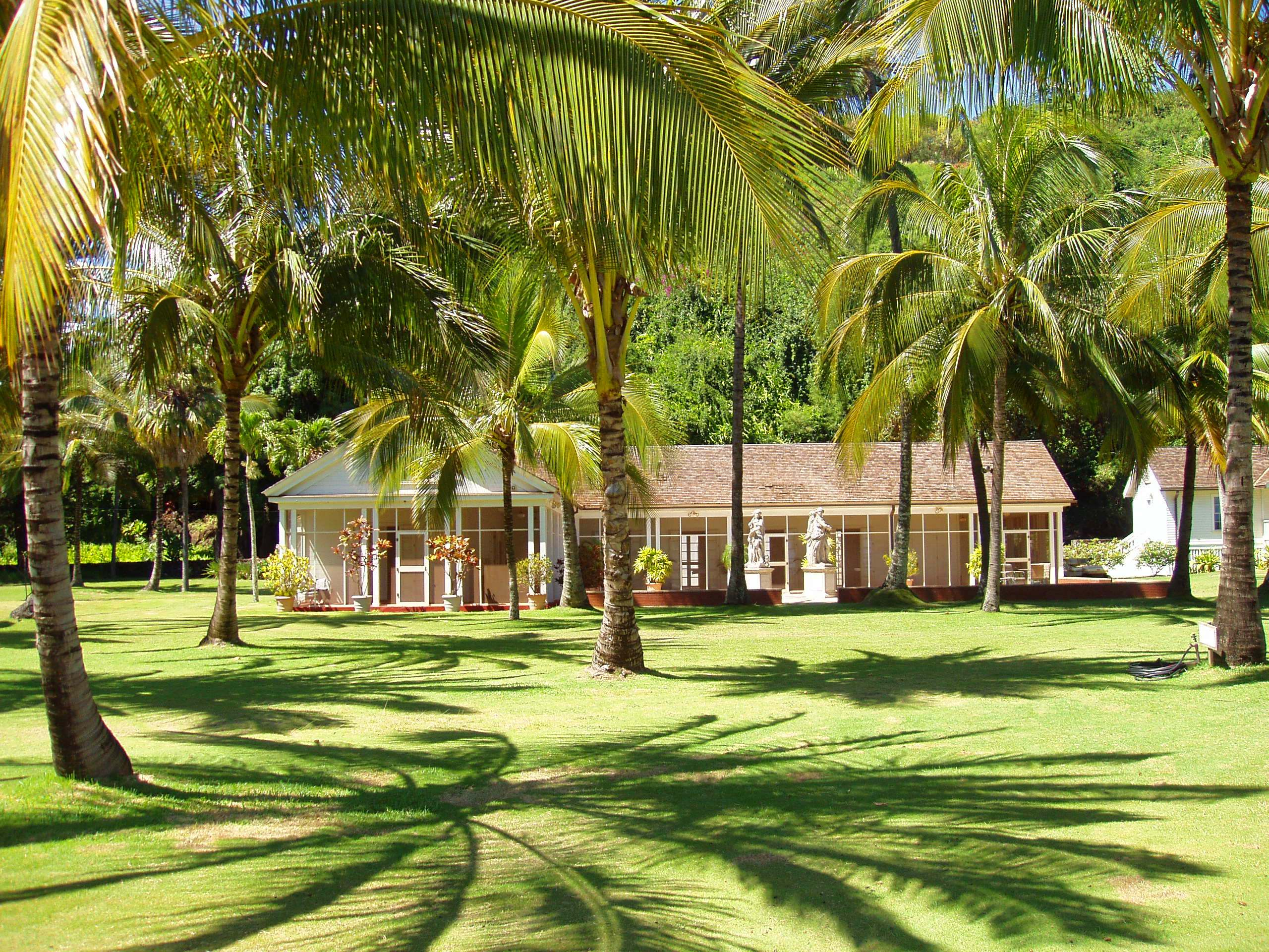 Allerton Garden, Kauai, Hawaii - Allerton house.